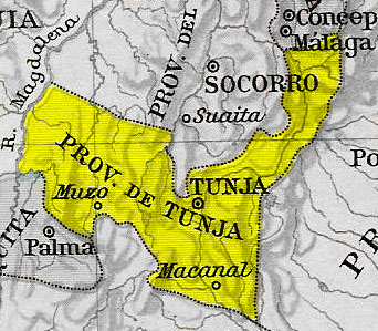 Mapa de la Provincia de Tunja en 1810 y 1830